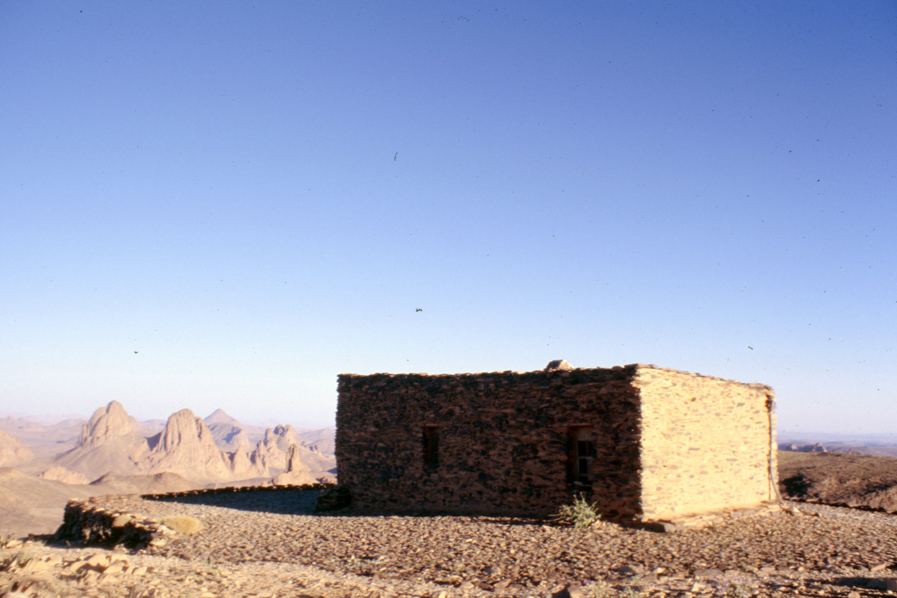 Ermitage de Charles Foucauld sur le plateau de l'Asskrem à 2780 m, dans le Hoggar, à 80 km de Tamanrasset dans le sud algérien. Contruit en juillet 1911.